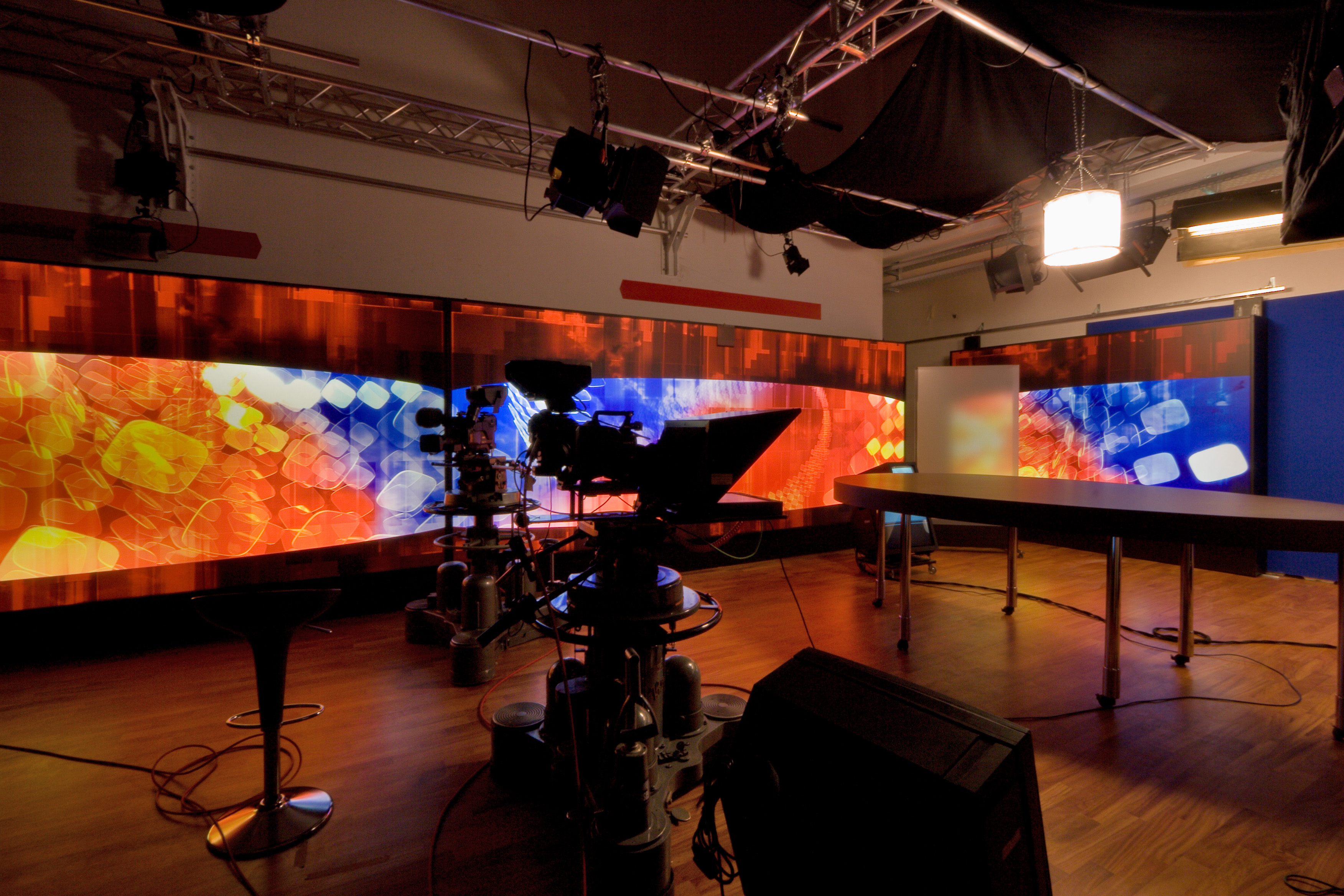 Telebasel Studio